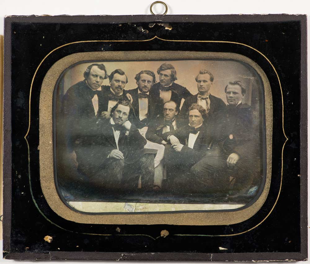 Gjestespillende mannlige skuespillere fra Det norske Theater i Trondheim ant. 1854. Peter Nielsen (1), Harald Nielsen (2), Jacob Prom (3), Hans Brun (4), Andreas Isachsen (5), Johannes Brun (6), Karl Hansen (7), B. A. Bottelsen (8), T. Hestenes (9). source